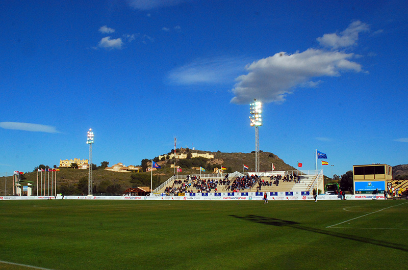 La Manga Stadium, Spain